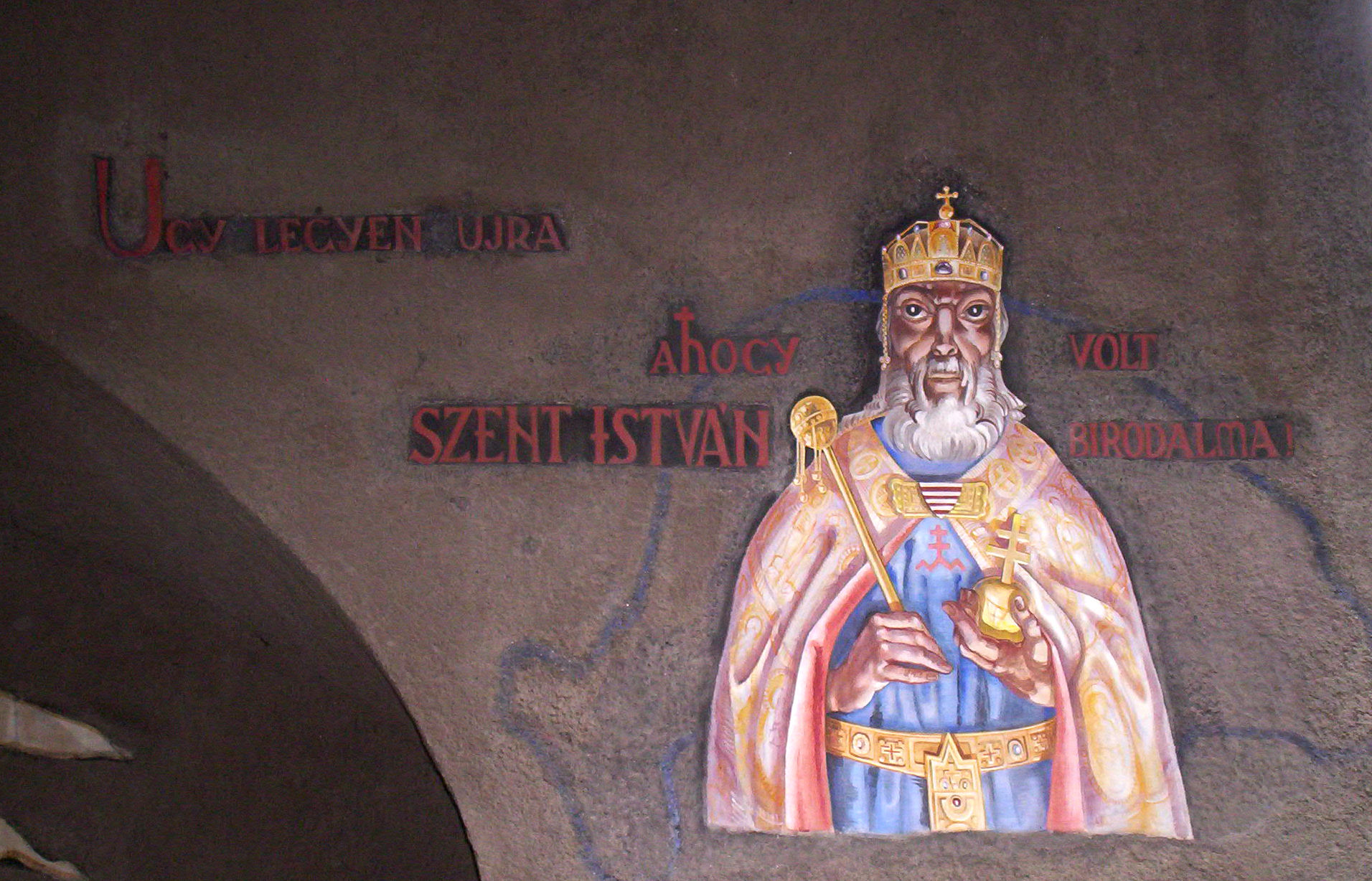 Szent István. A szegedi Hősök kapuja (Porta Heroum) freskója. Festette Aba-Novák Vilmos Stefán Henrik segédletével, 1937-ben. – photo taken by uploader User:Csanády in 2006.